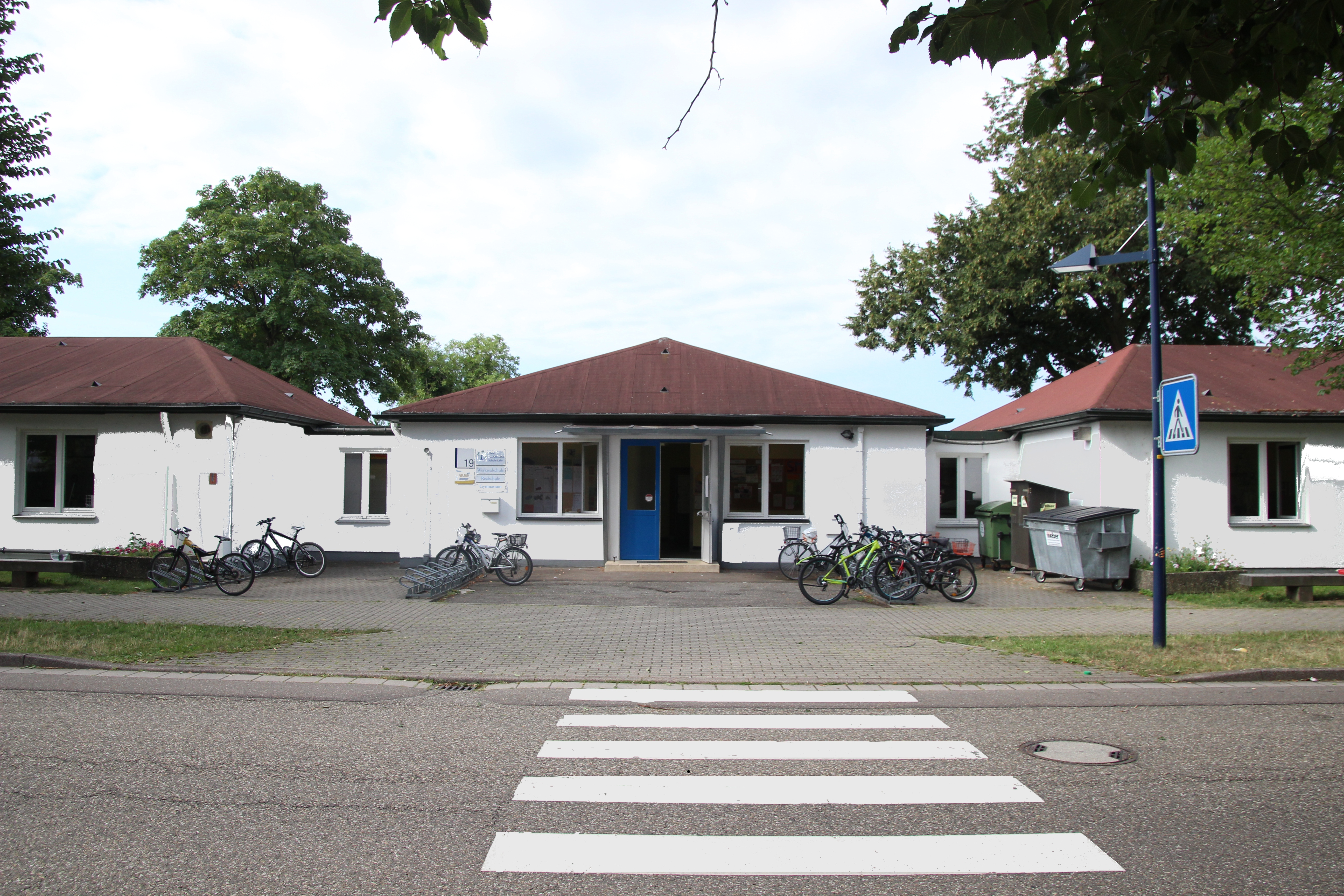 Das ist ein von mir gemachtes Foto mit gimp 2.6 bearbeitetes Schulhaus foto